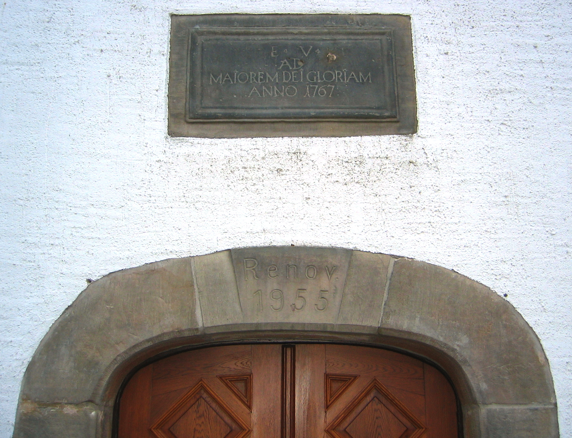 Inschriften am Eingang der 1767 errichteten St.-Josefs-Kapelle in Kühlsen, Bad Driburg, Deutschland.